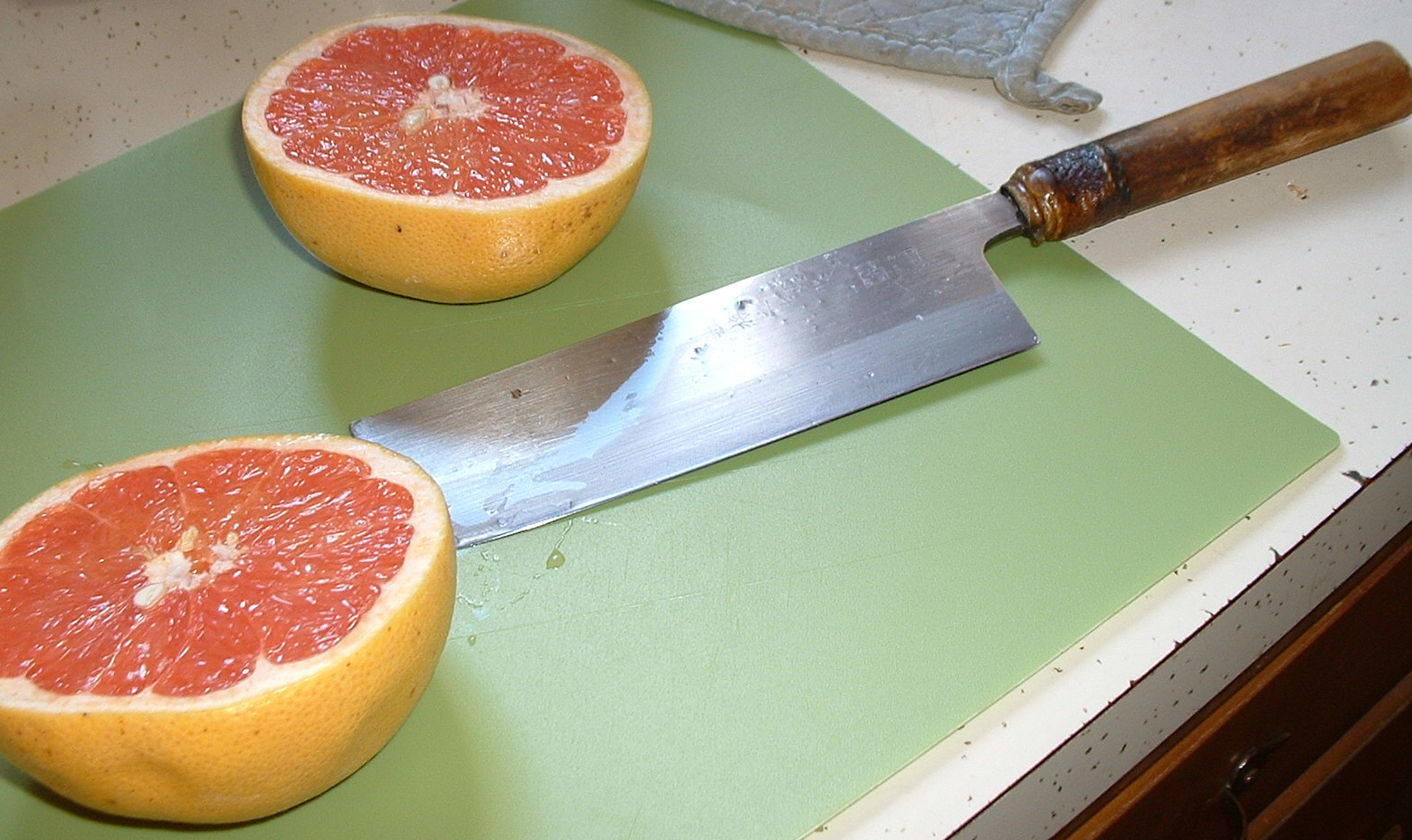 Grapefruit; 2 halves